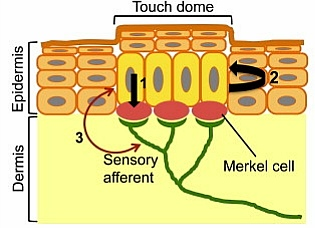 Fig. 1_ Domo, poblaciones celulares.